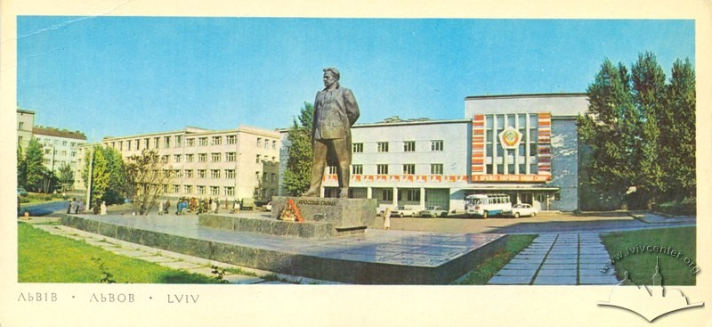 Фото памятника писателю-антифашисту, публицисту Я. Галану , установлен во Львове в 1970 году и демонтирован украинскими властями в 1990-е гг., скульптор Г. Якименко (Издательство "Искусство", Киев)